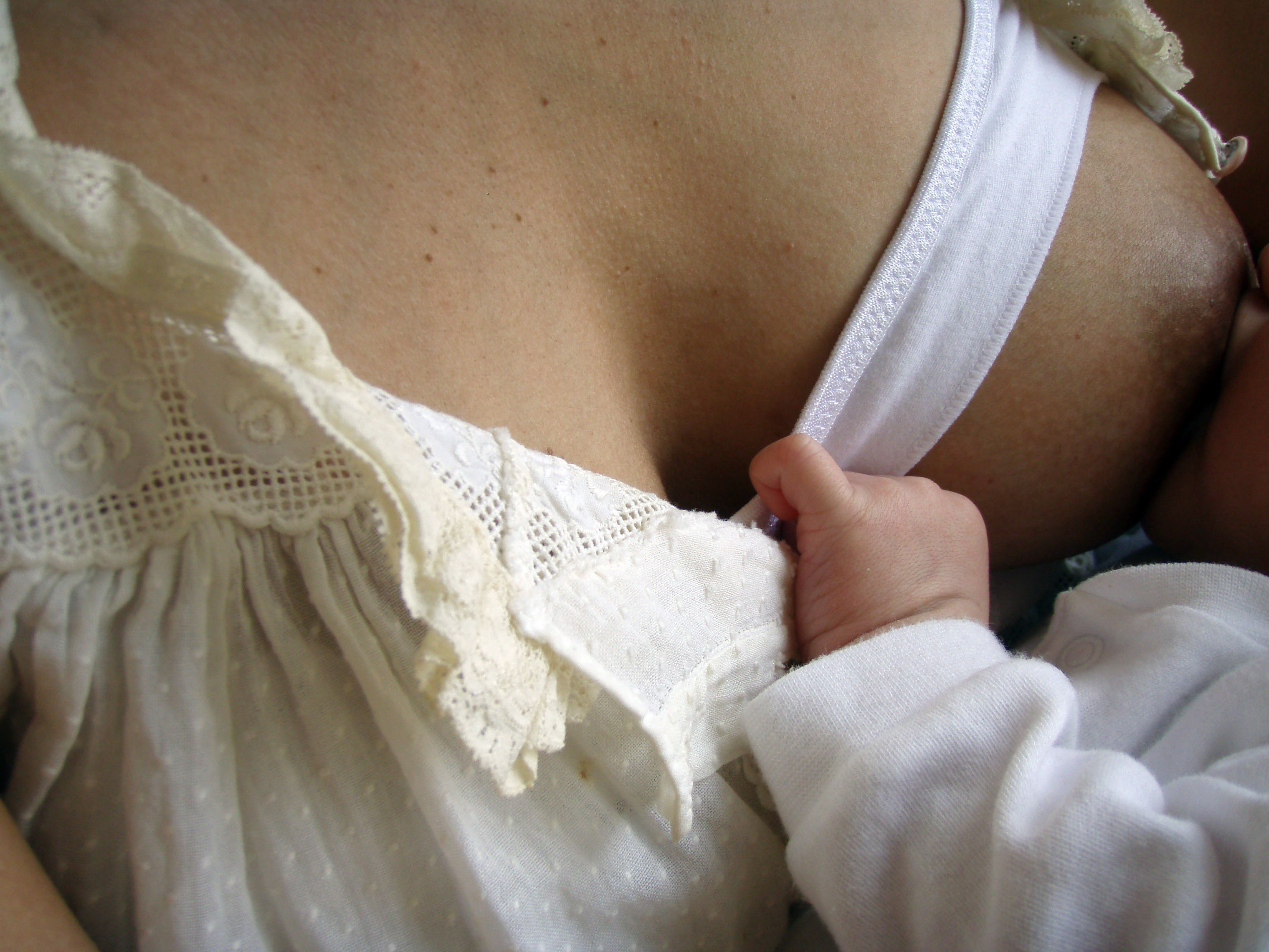 Meñique